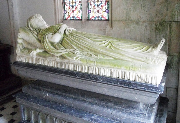 Śpiąca Luiza Vecseghy – rzeźba nagrobna z kaplicy księcia Sułkowskiego w Feistritz am Wechsel